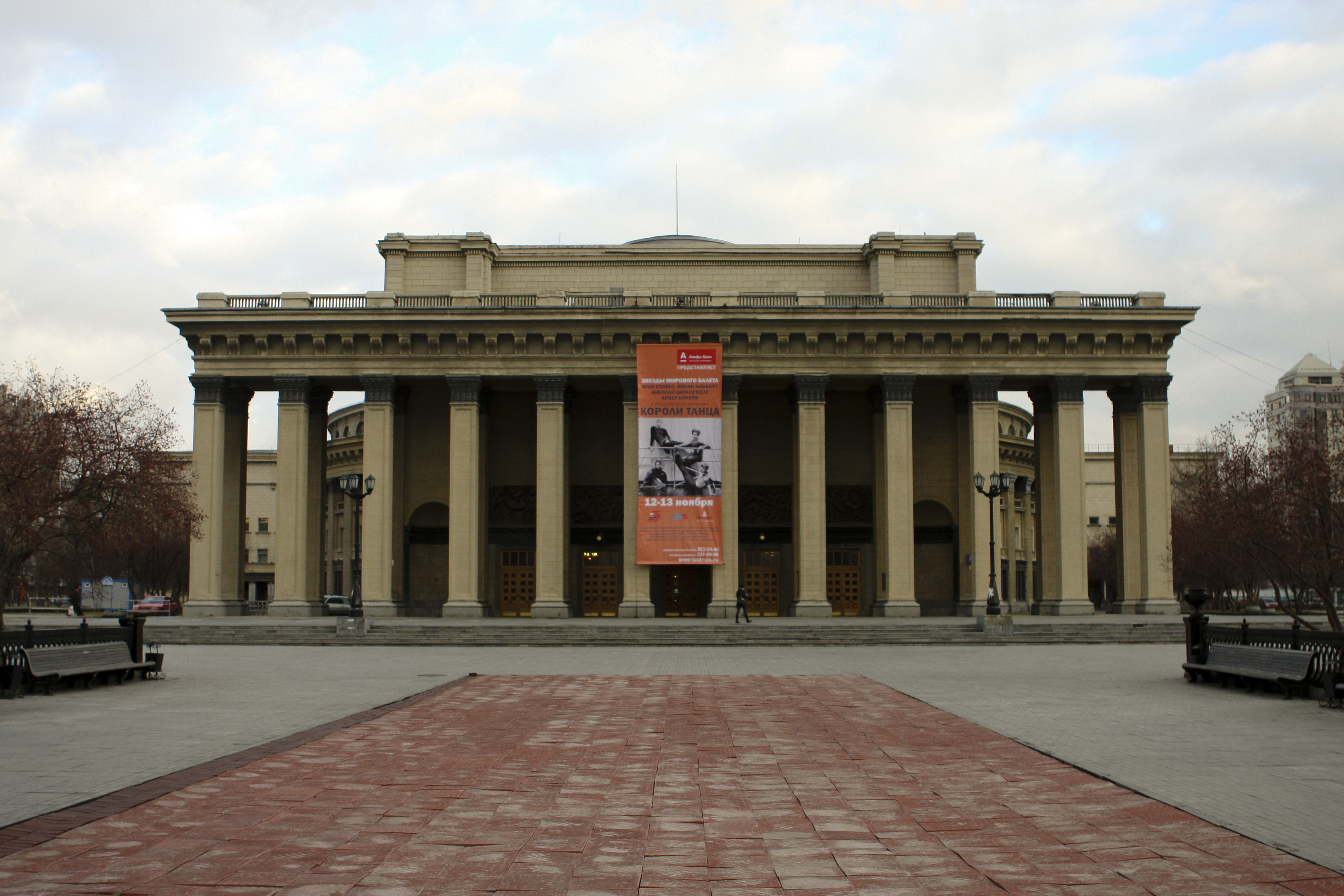 Novosibirsk Opera and Ballet theater Novosibirsk, Russia, November 2008